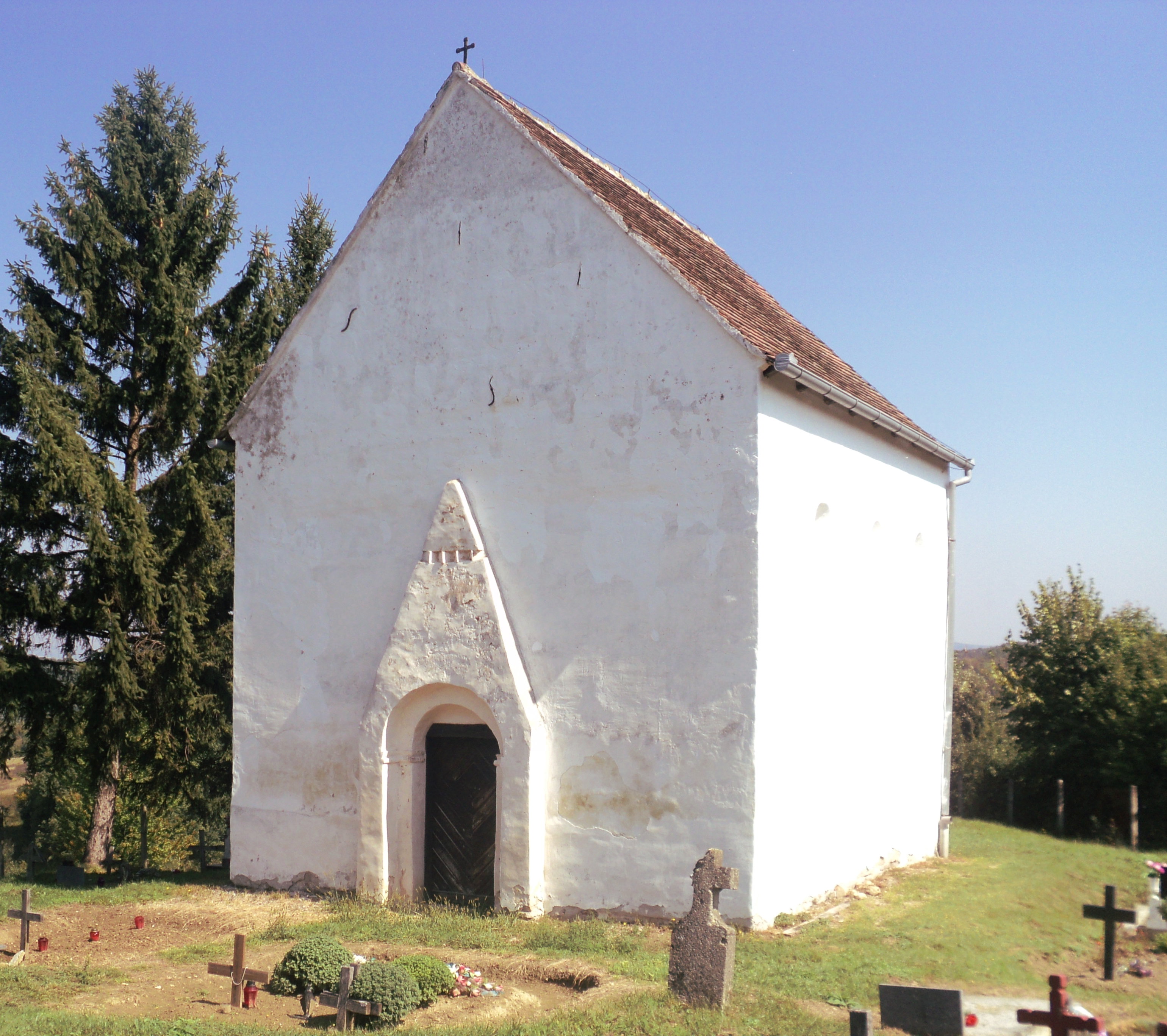 Crkva sv. Martina u Lovčiću iz 13. stoljeća